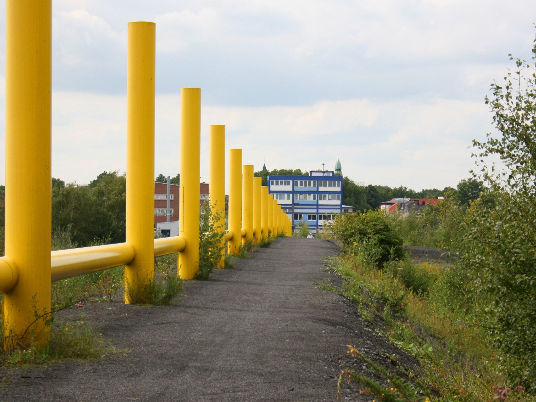 „Über(n) Ort“ auf der Halde Lothringen in Bochum, östlicher Abschnitt